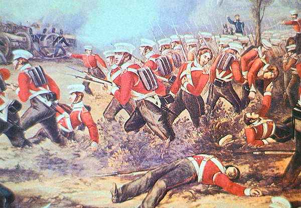 Détail du tableau représentant la charge du 31ème Régiment d'Infanterie à la bataille de Mudki en 1845, pendant la première guerre anglo-sikhe